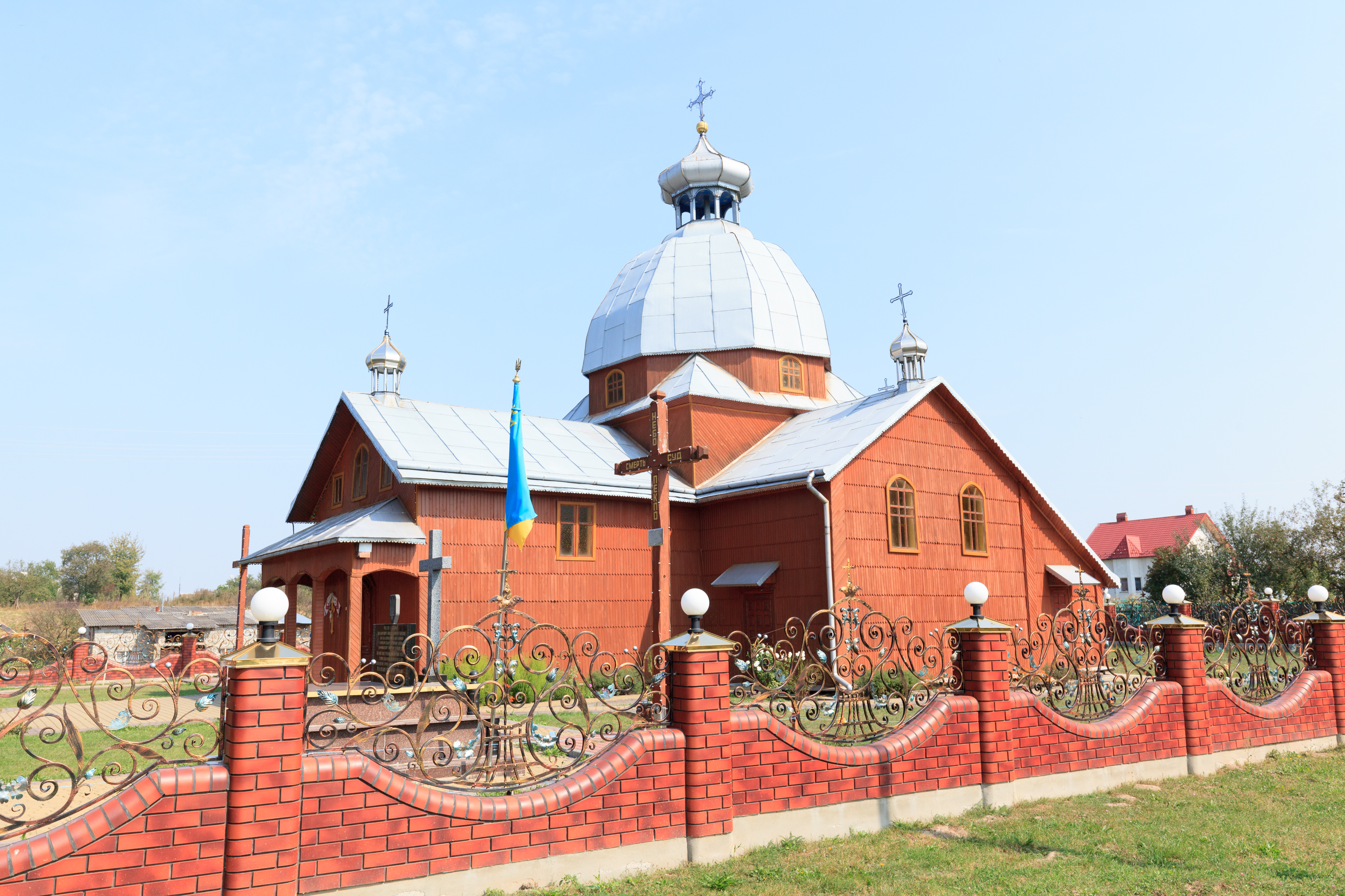 Церква Успення Пресвятої Богородиці(дер.), с.Моранці